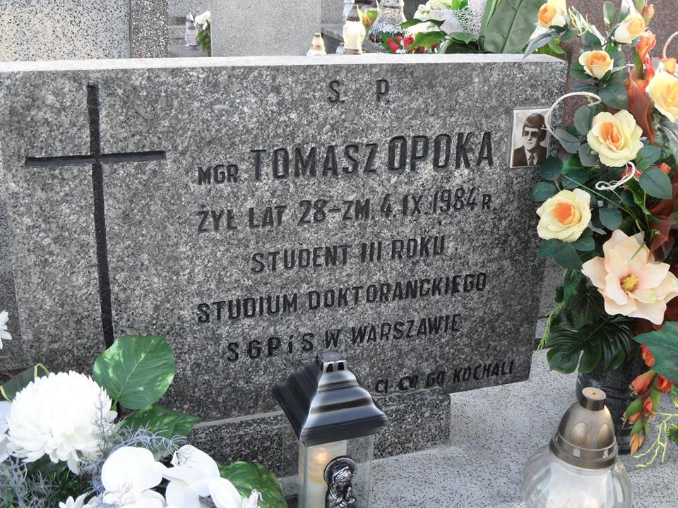 Grób Tomasza Opoki na cmentarzu w Inowłodzu